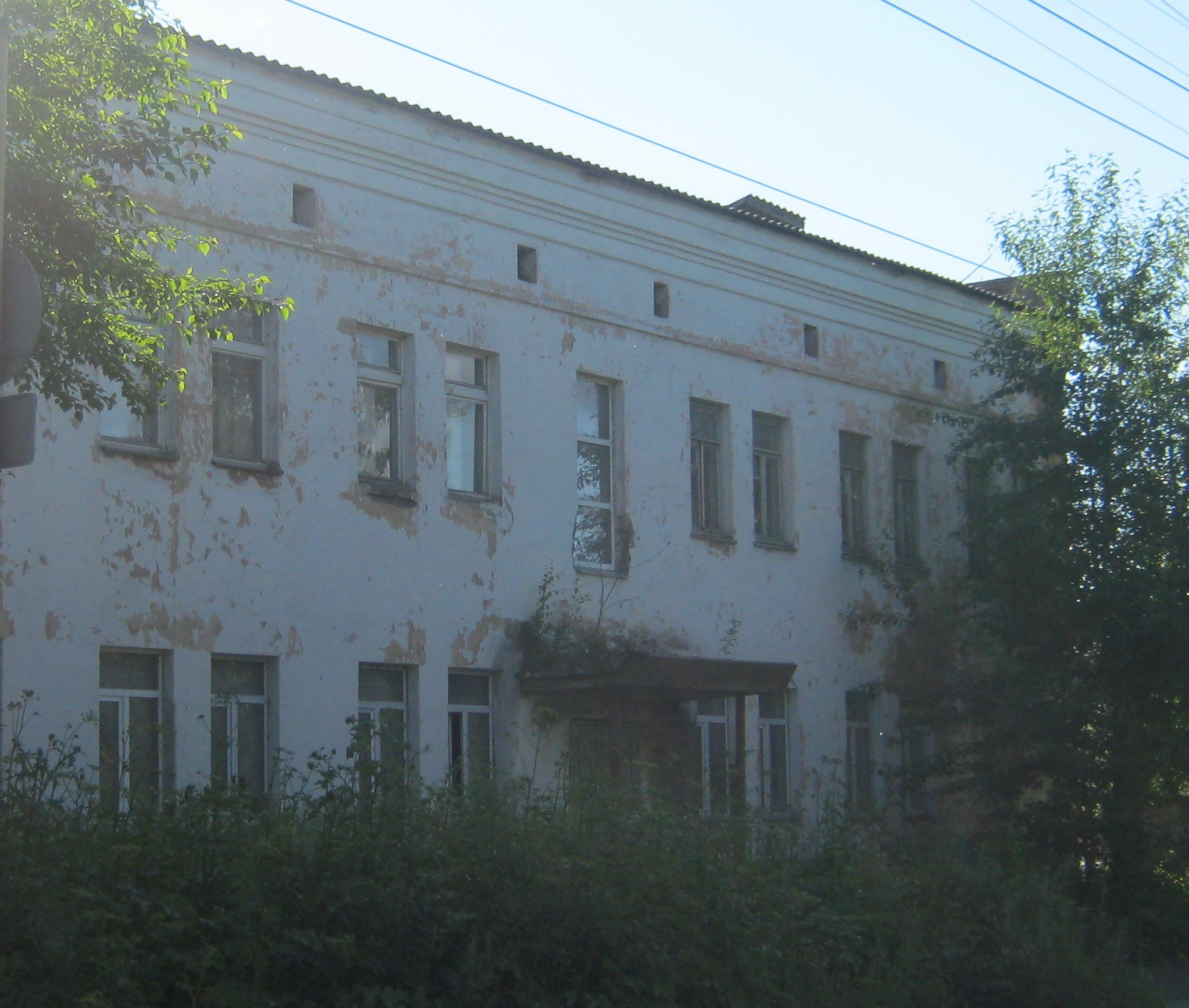 Промышленность Петрозаводска